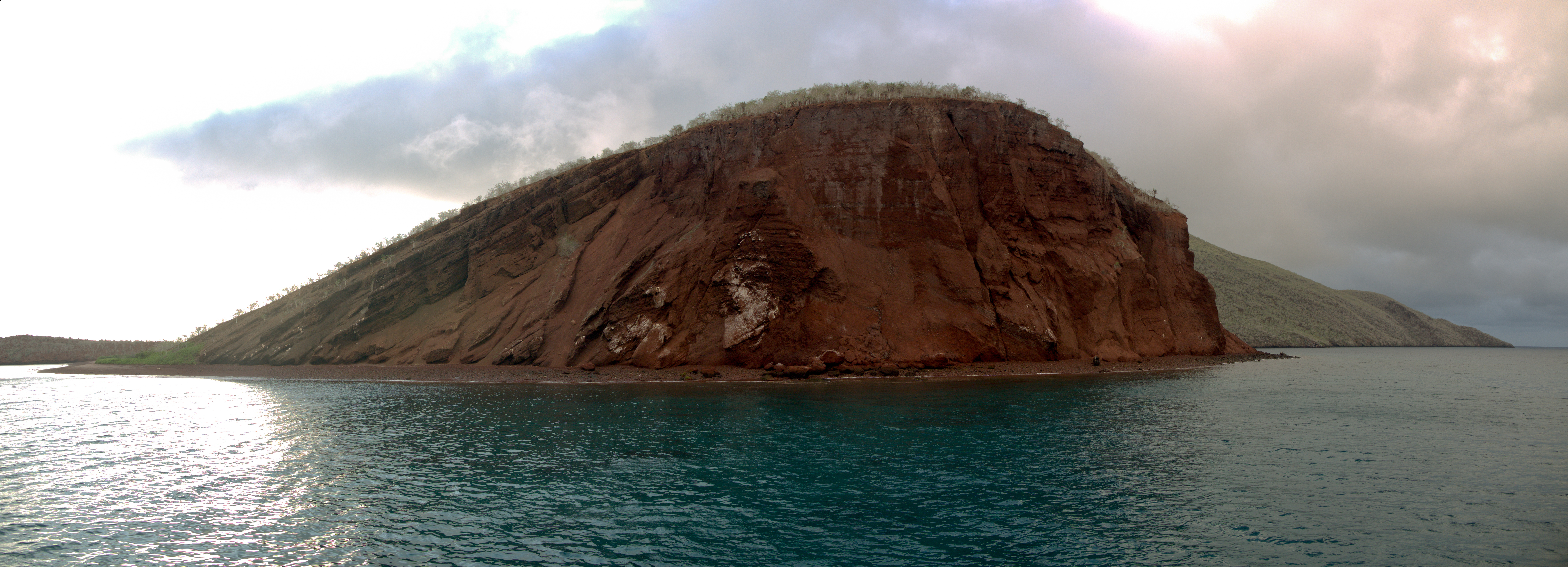 Panorama of Rábida Island, Galapagos